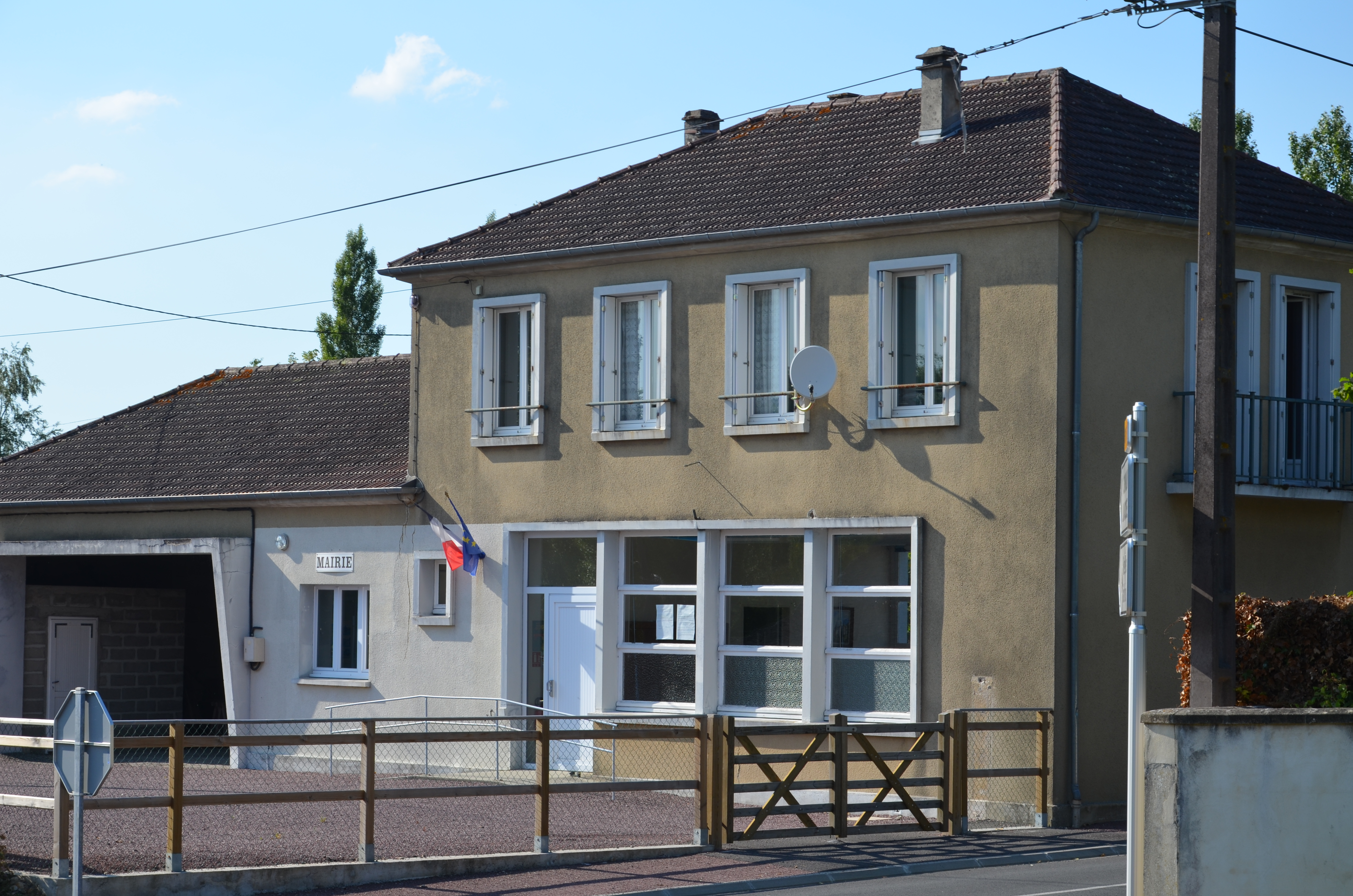 Mairie de La Lande-sur-Drôme.